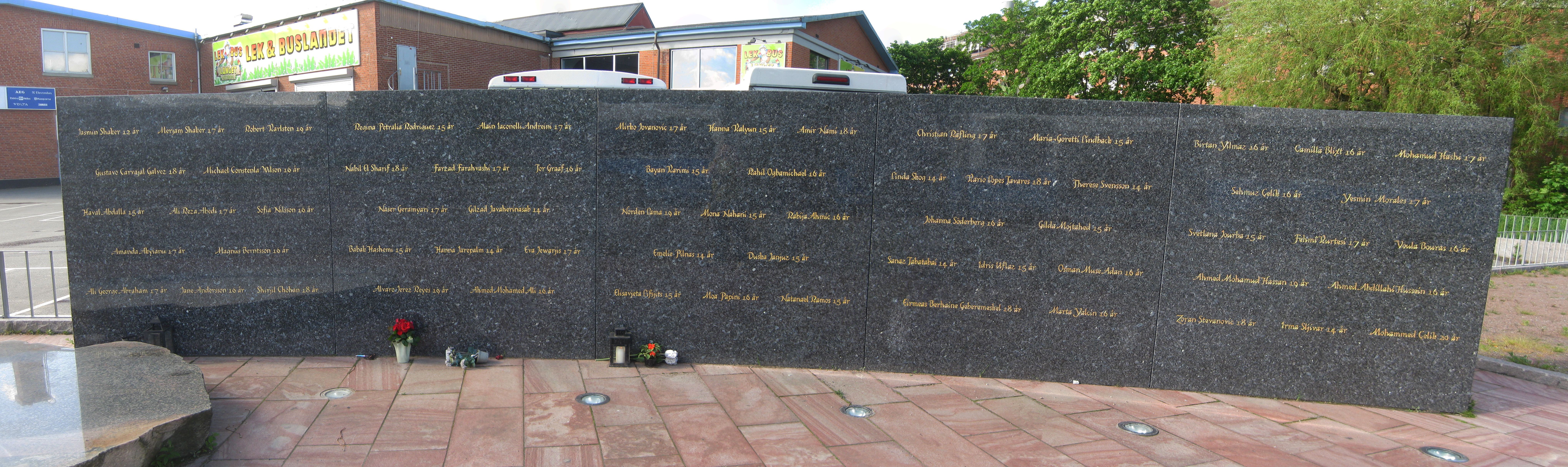 Minnessten skapad av Claes Hake.